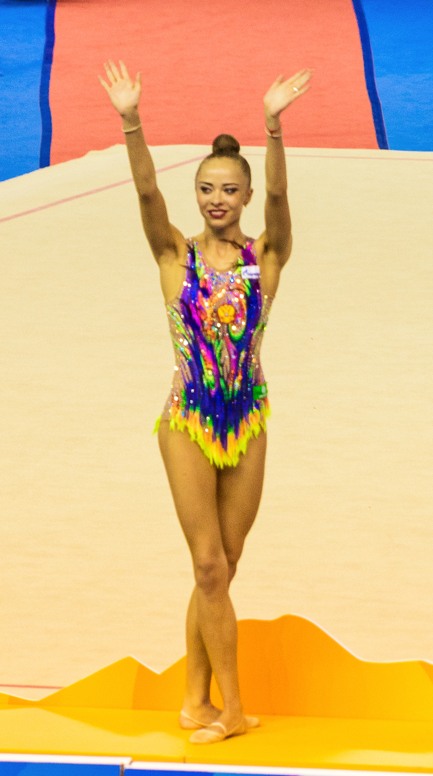 2017 Taipei Summer Universiade